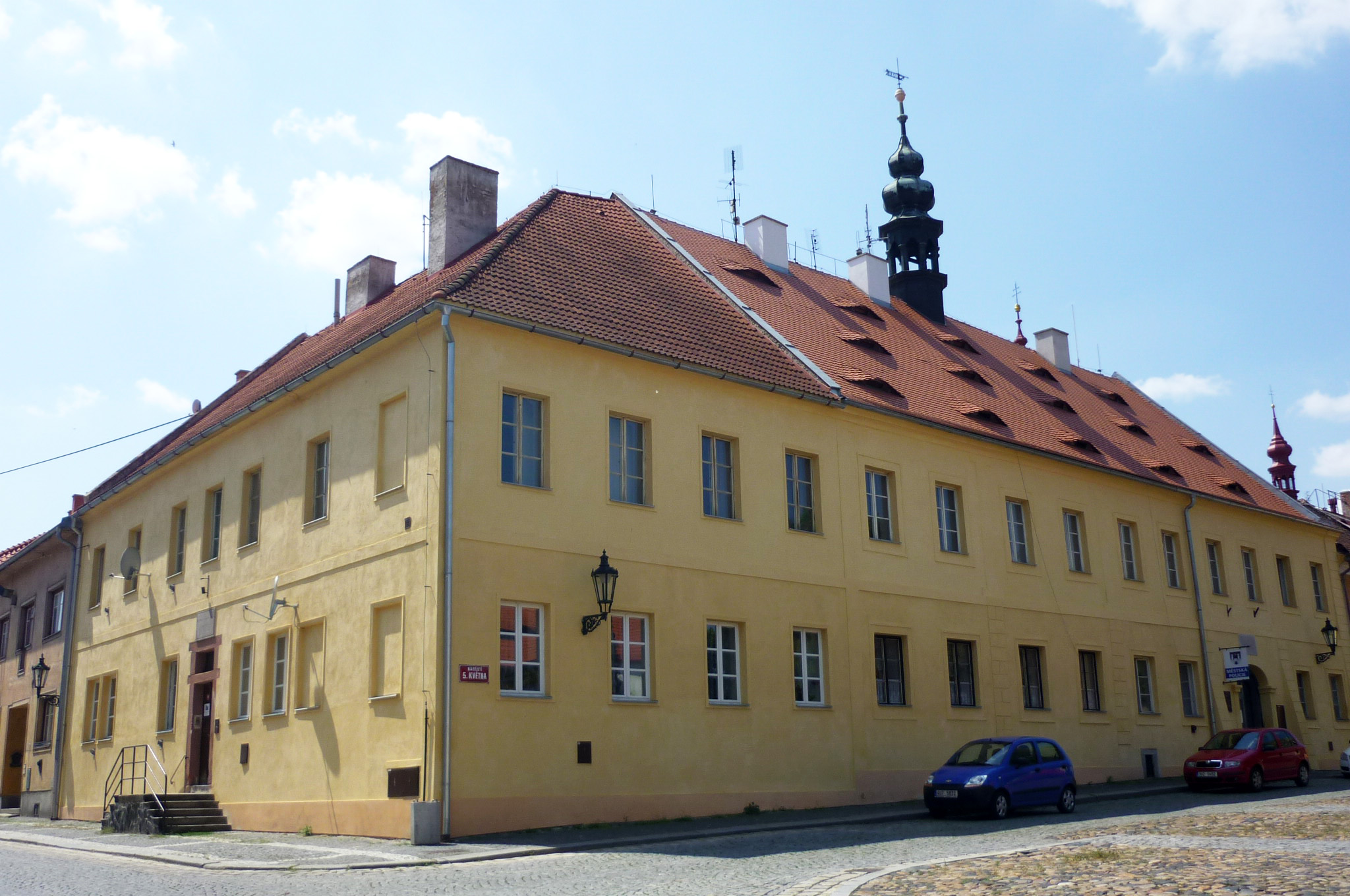 Žatec, Hošťálkovo náměstí 126, náměstí 5. května 127.